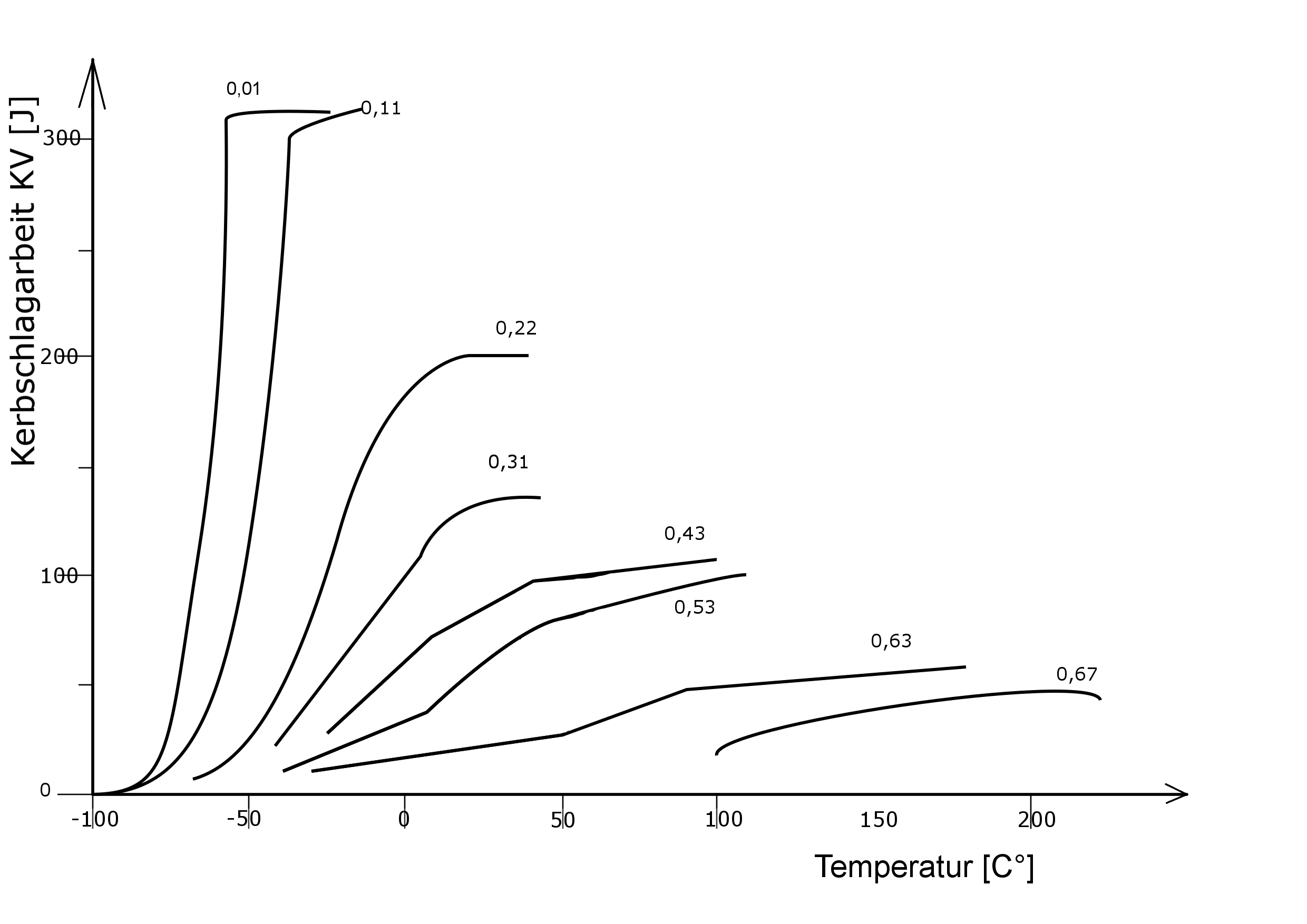 Einfluss des Kohlenstoffgehalts auf die im Kerbschlagbiegeversuch nach Charpy bestimmte Temperaturabhängigkeit der Kerbschlagarbeit KV. Es ist deutlich zu erkennen, dass je höher der Kohlenstoffgehalt, desto geringer die Kerbschlagarbeit.